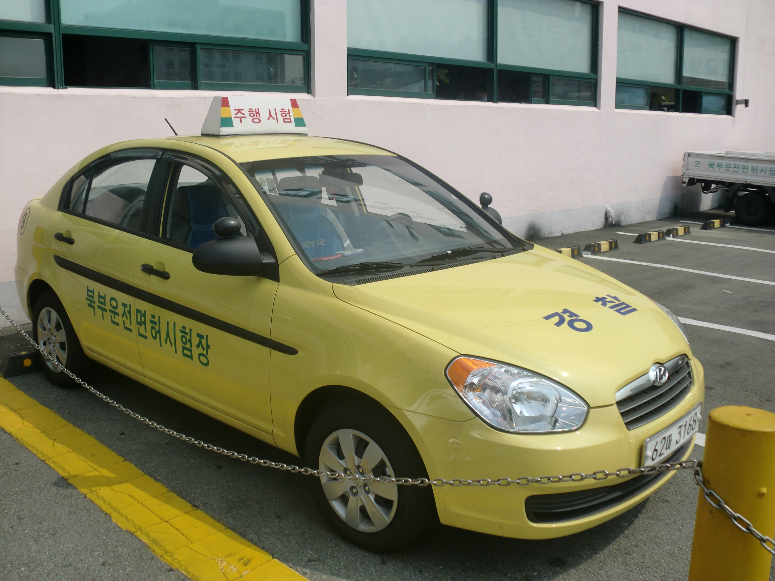 현대 베르나 (도로주행용)